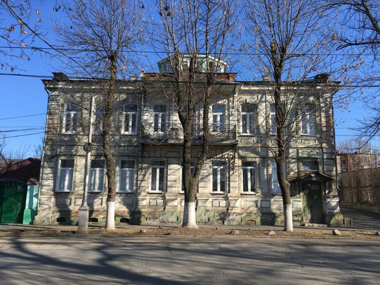 Чермена Баева, 11, Владикавказ